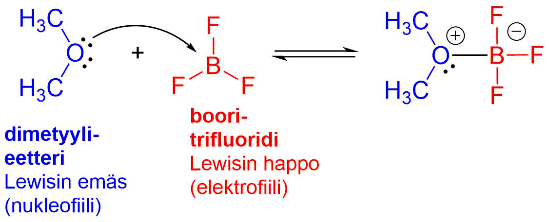 BF3 on Lewisin happo, joka ottaa vastaan elektroniparin dimetyylieetteriltä.